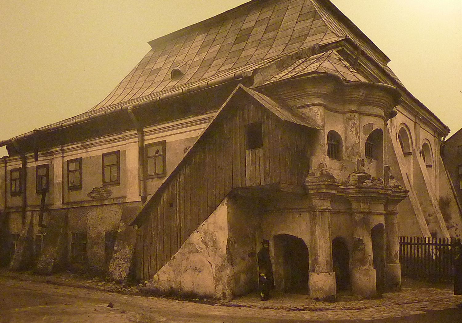 Synagoga w Przeworsku – nieistniejąca renesansowa synagoga, która znajdowała się na Starym Mieście w Przeworsku. Podpis pod zdjęciem: "XVII wieczna synagoga w Przeworsku, kompletnie zniszczona w czasie wojny. Zdjęcie z 1934 roku."